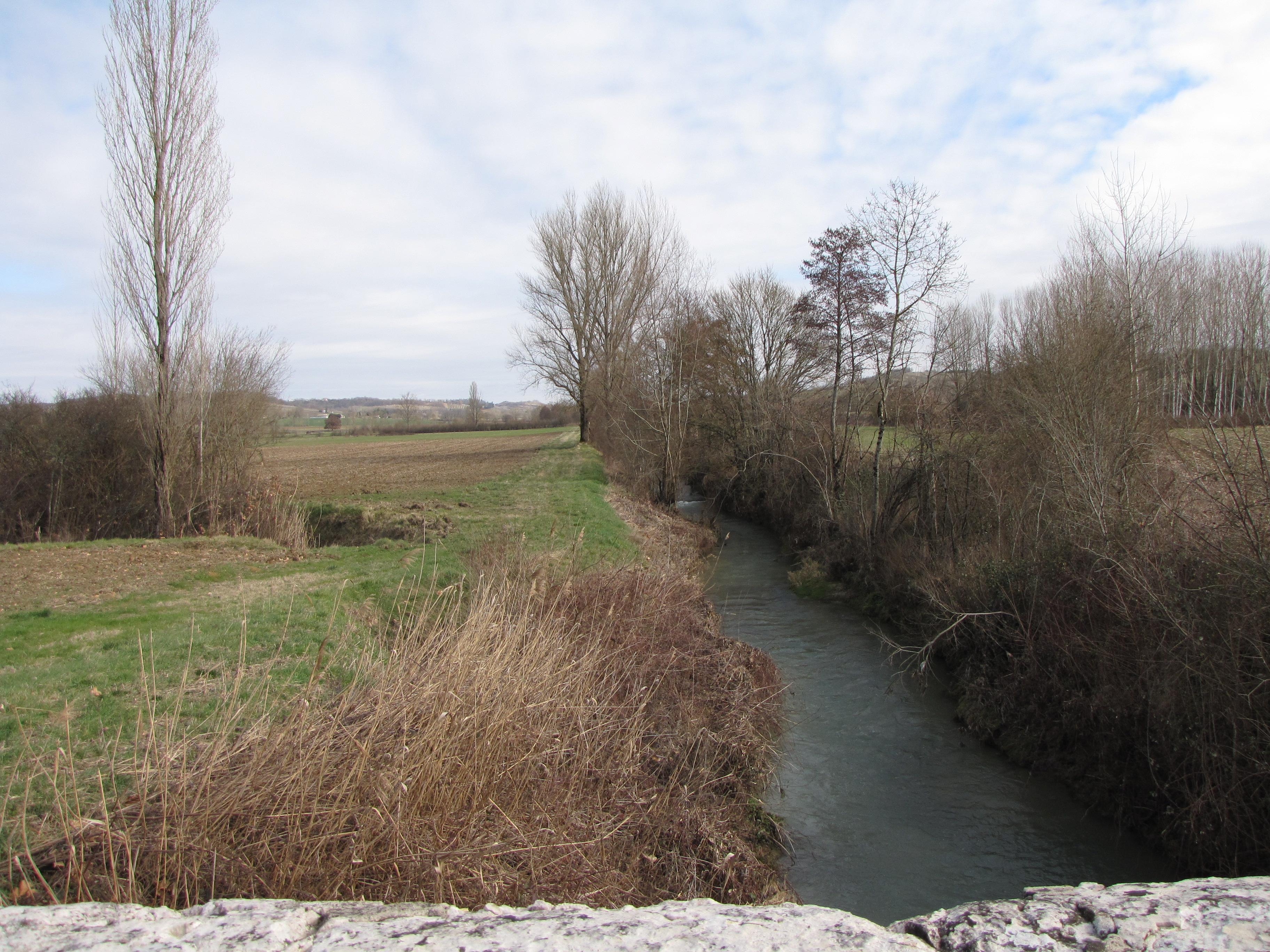 La Barguelonne